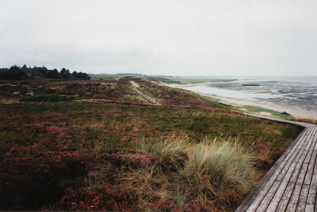 Naturschutzgebiet „Braderuper Heide/Sylt“